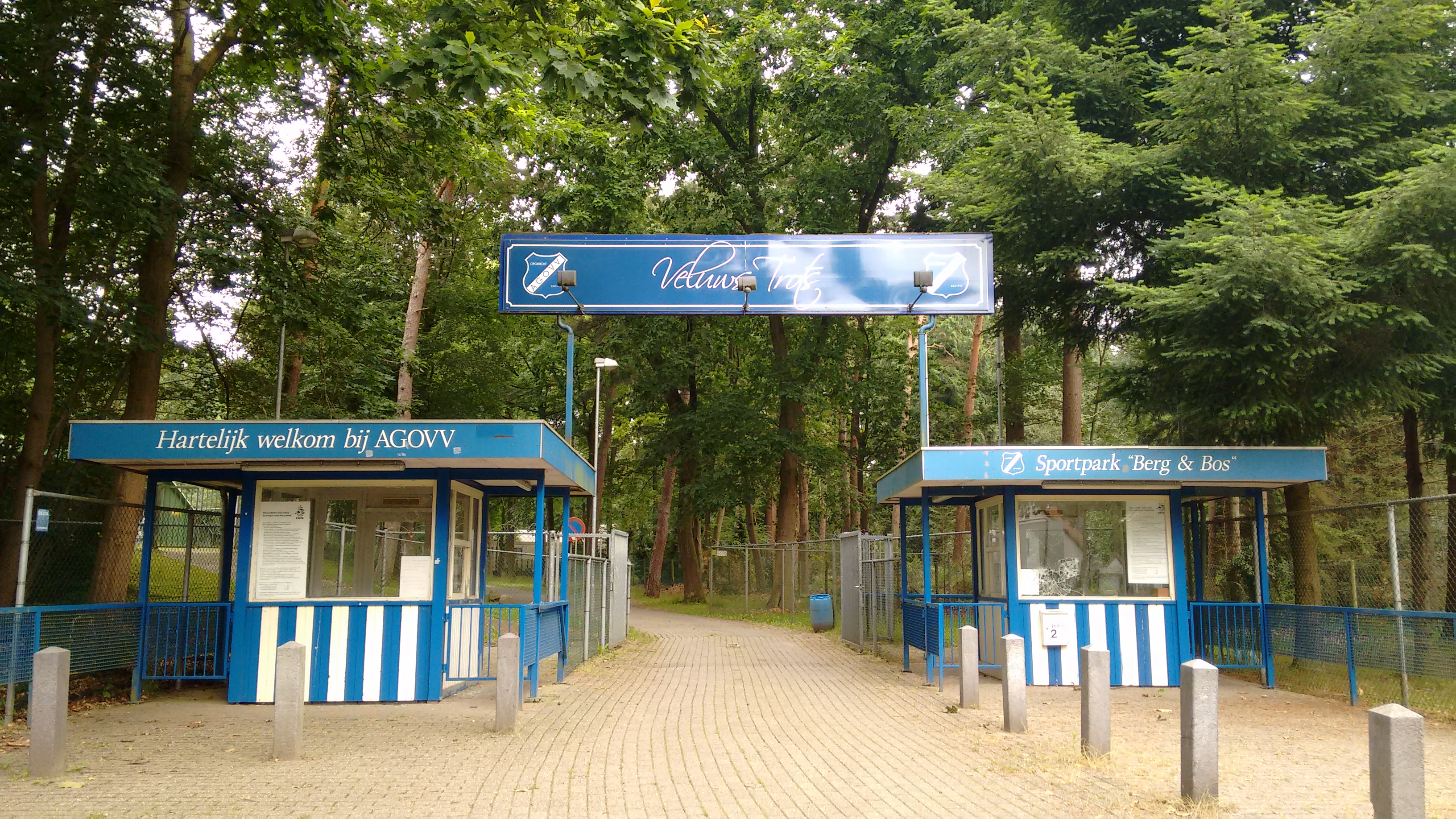 De entree van Sportpark Berg & Bos van voetbalclub AGOVV. Teksten: 'Hartelijk welkom bij AGOVV', 'Veluws Trots', 'Sportpark "Berg & Bos"'.